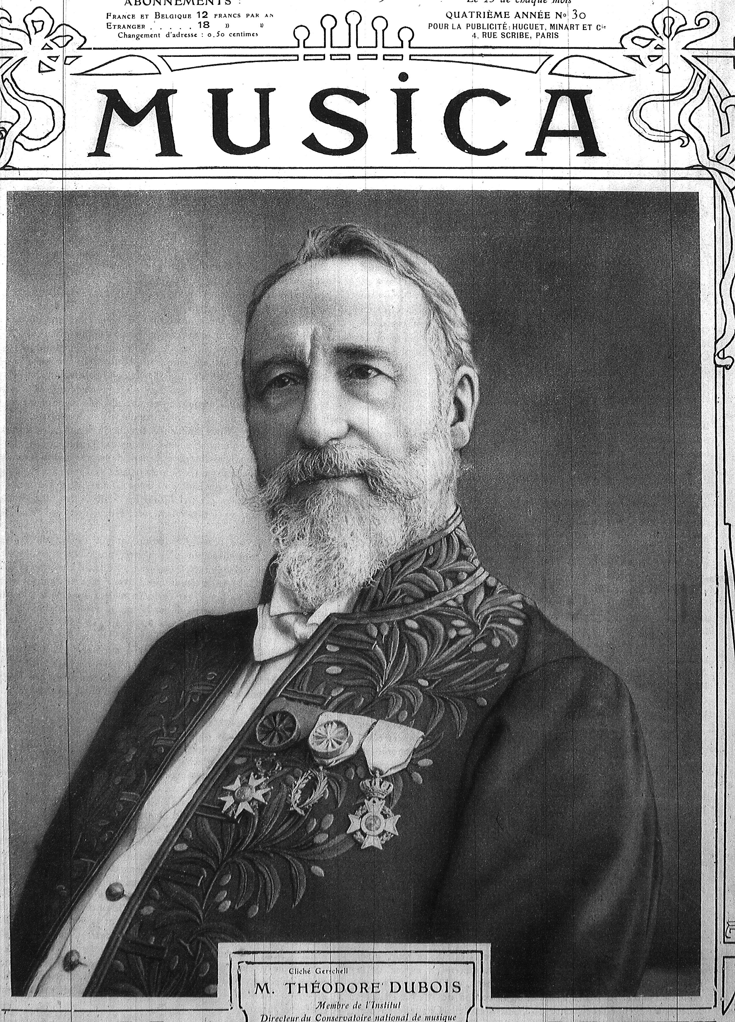 issu du fond iconnographique de la bilbiothèque de reims.